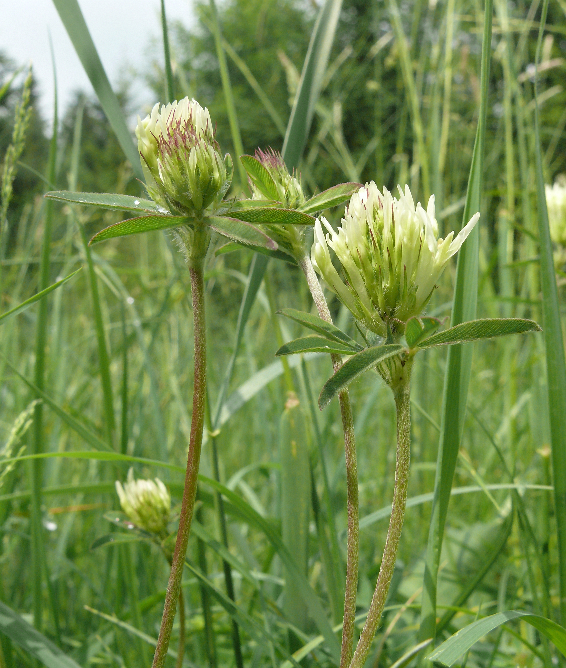 Trifolium ochroleucon, Schwäbisch-Fränkische Waldberge, Deutschland